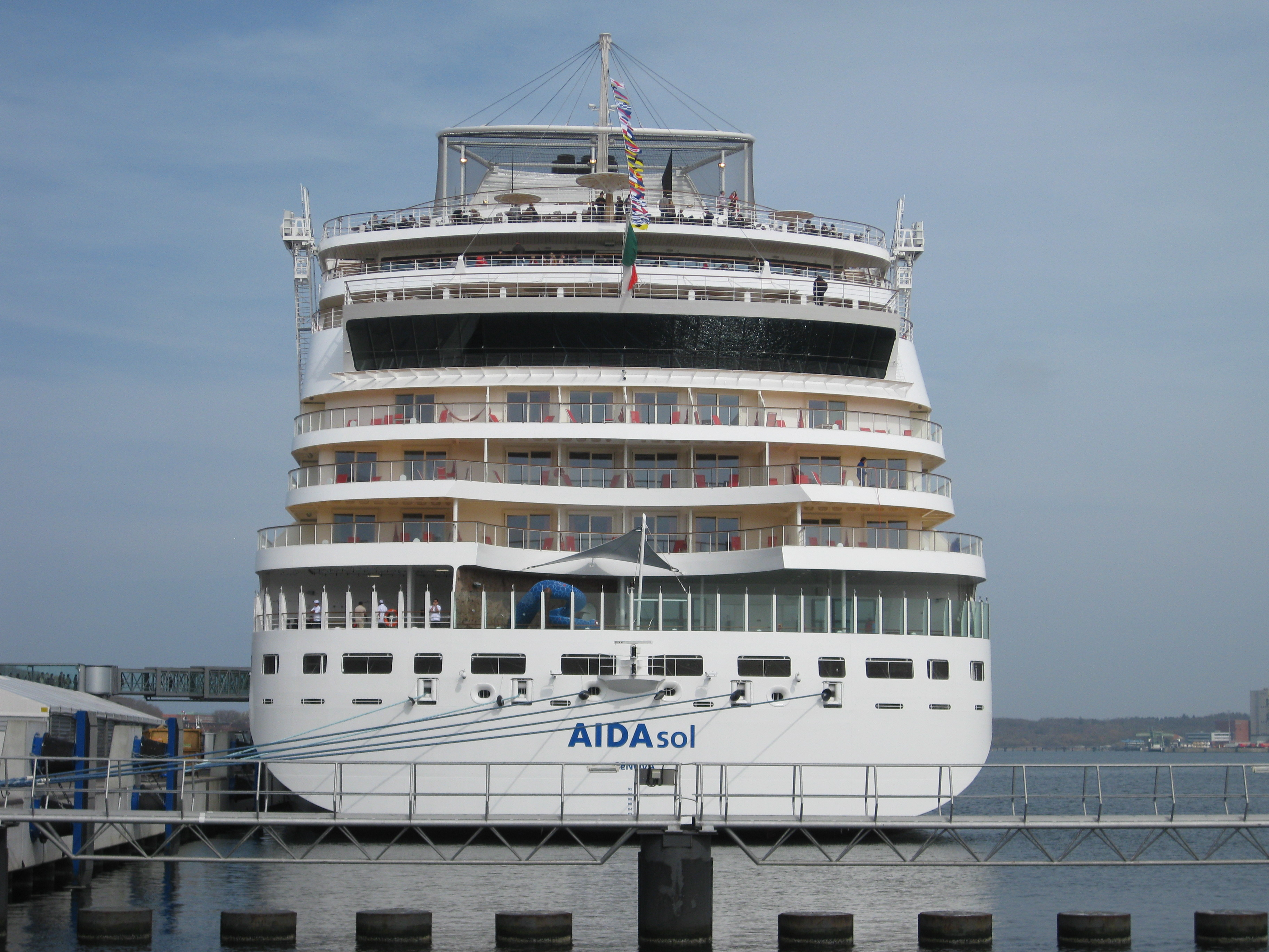 AIDAsol Heckansicht in Kiel am Ostseekai